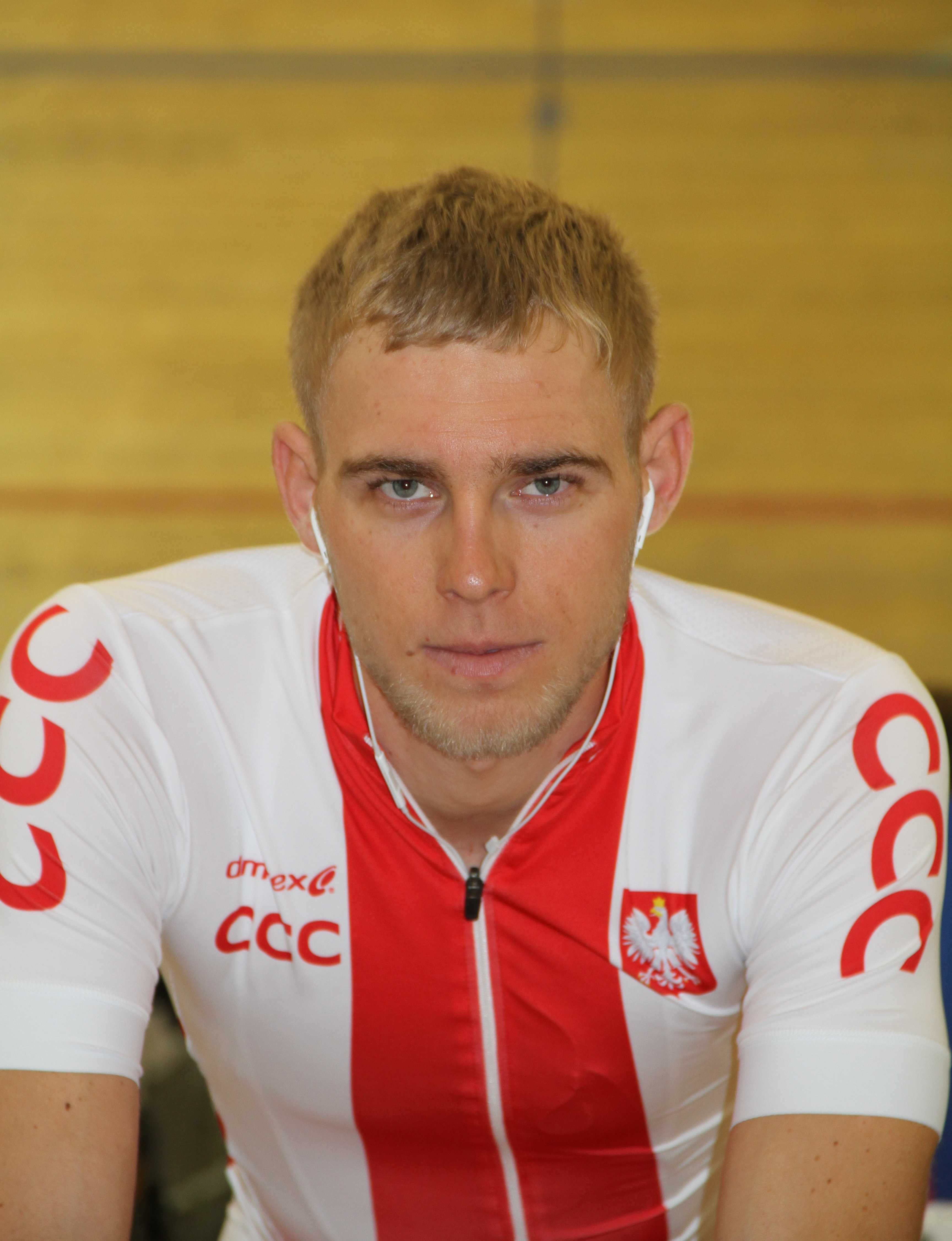 Adrian Tekliński, polnischer Radsportler The making of this document was supported by the Community-Budget of Wikimedia Germany.